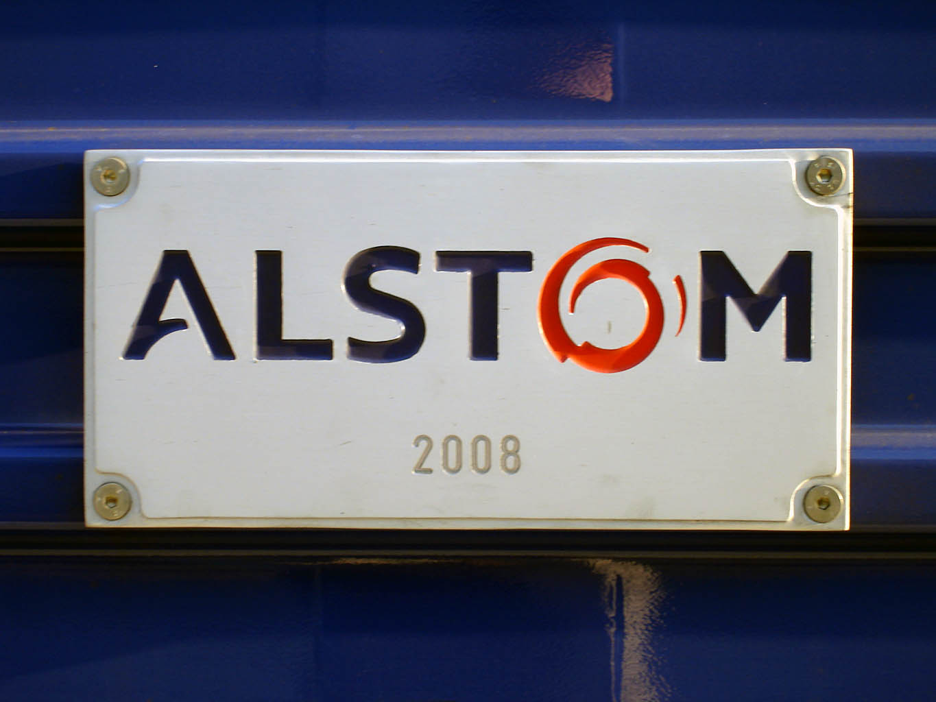 Plaque constructeur d'une locomotive BB 27300